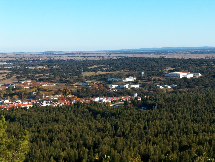 Vista geral de Valverde a partir do Castelo do Giraldo, Nossa Senhora da Tourega, Évora, Portugal